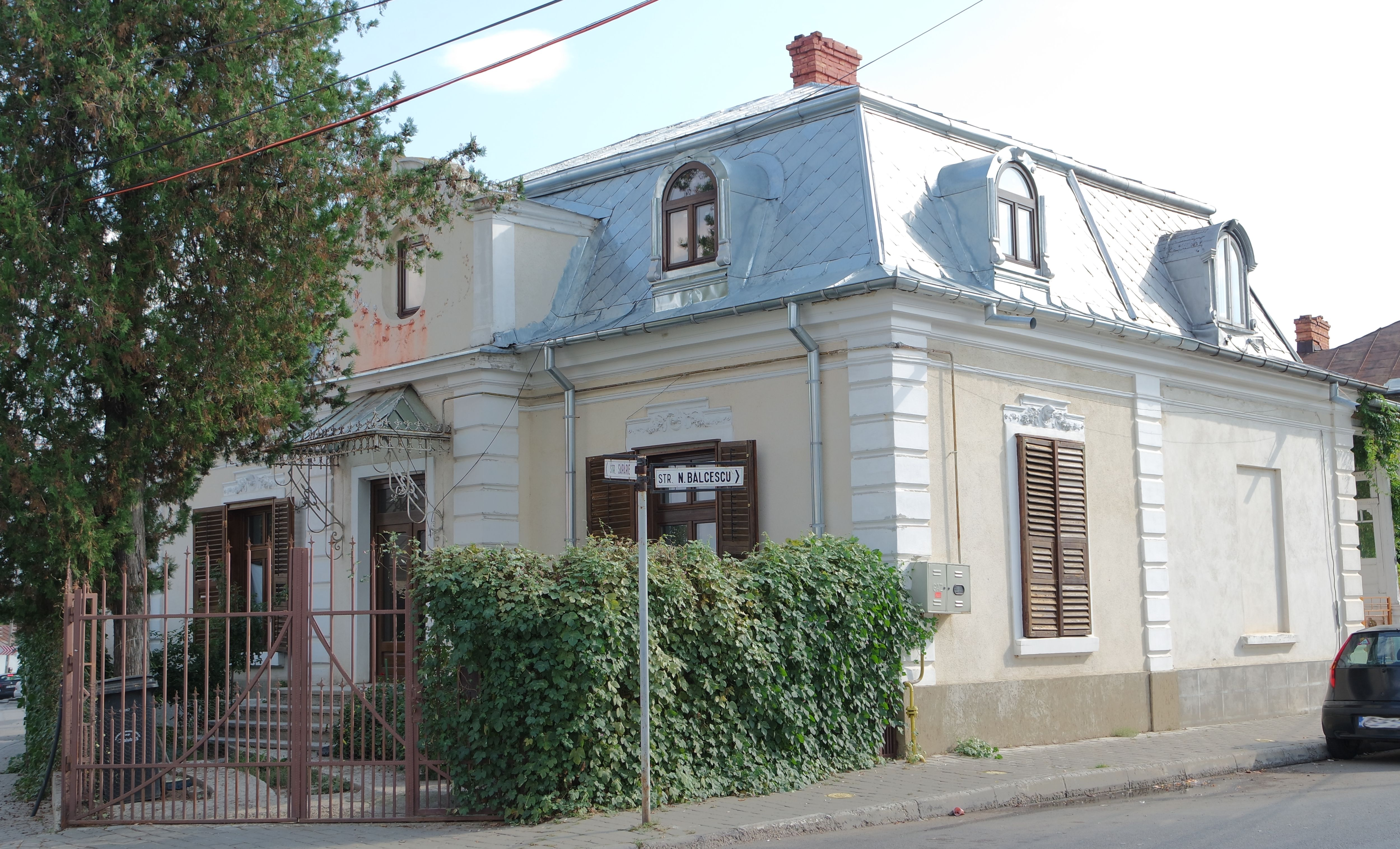 Vila Virginia Iasi, Str.Nicolae Balcescu Nr.1